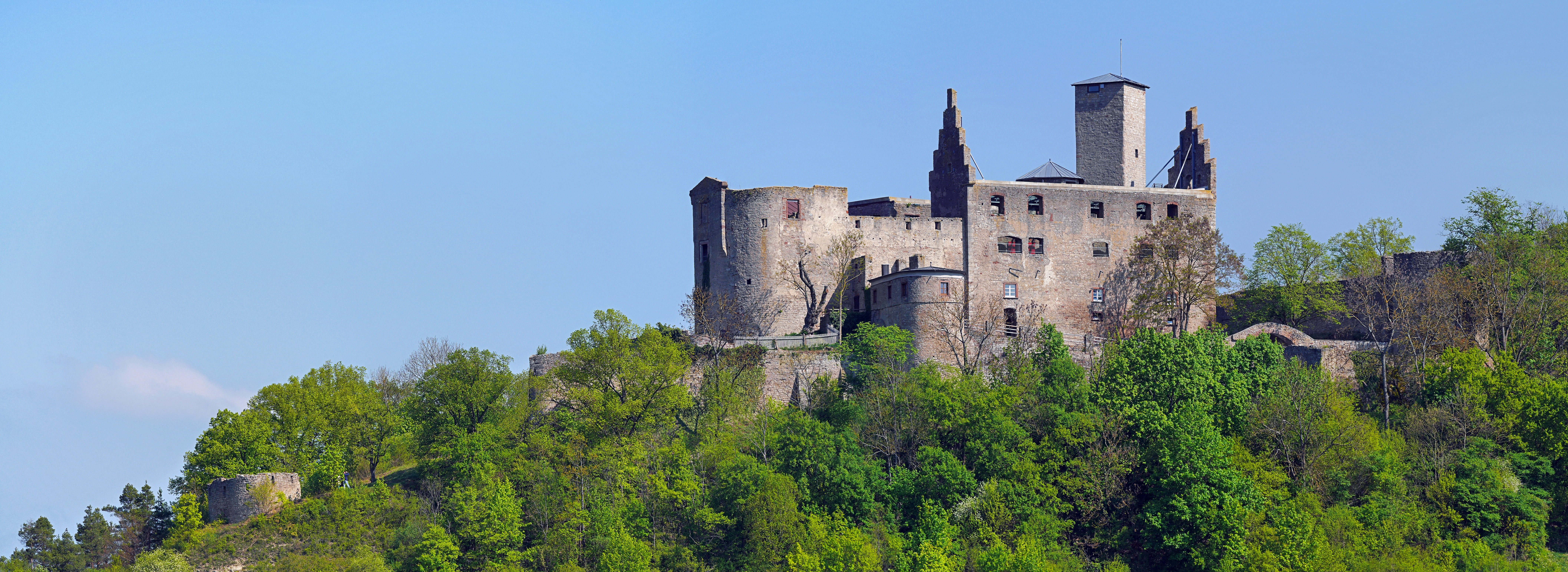 Die Trimburg ist die Ruine einer mittelalterlichen Höhenburg östlich des gleichnamigen Ortes in Unterfranken. Die Ruine wurde ab 1135 erbaut und ist ab 1806 langsam verfallen. Sie liegt weithin sichtbar etwa 60 Meter oberhalb der Fränkischen Saale auf dem Pfaffenberg. Diese Datei wurde mit Hugin erstellt.